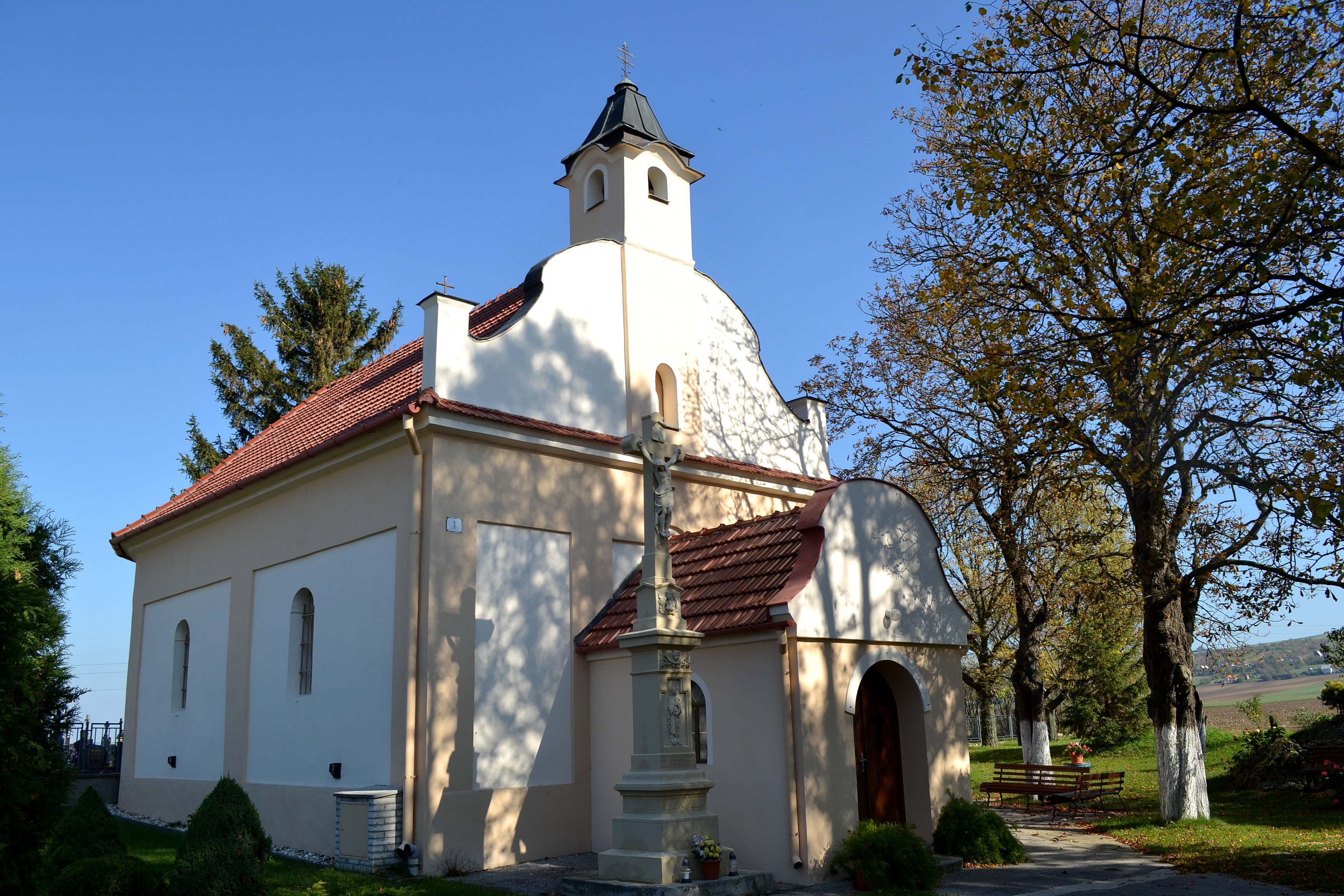 Prietržka (okr. Skalica), Kostol svätej Alžbety; celkový pohľad